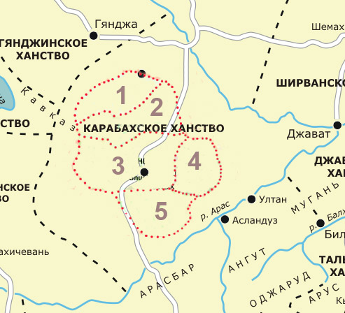 Xəmsə məliklikləri 1-Gülüstan 2-Çiləbörd 3-Xaçın 4-Vərəndə 5-Dizaq